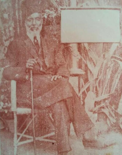 صورة للشيخ ساتي ماجد مطبوعة على غلاف كتاب شياخة الأسلام في أمريكا للمؤلف عبدالحميد محمد أحمد